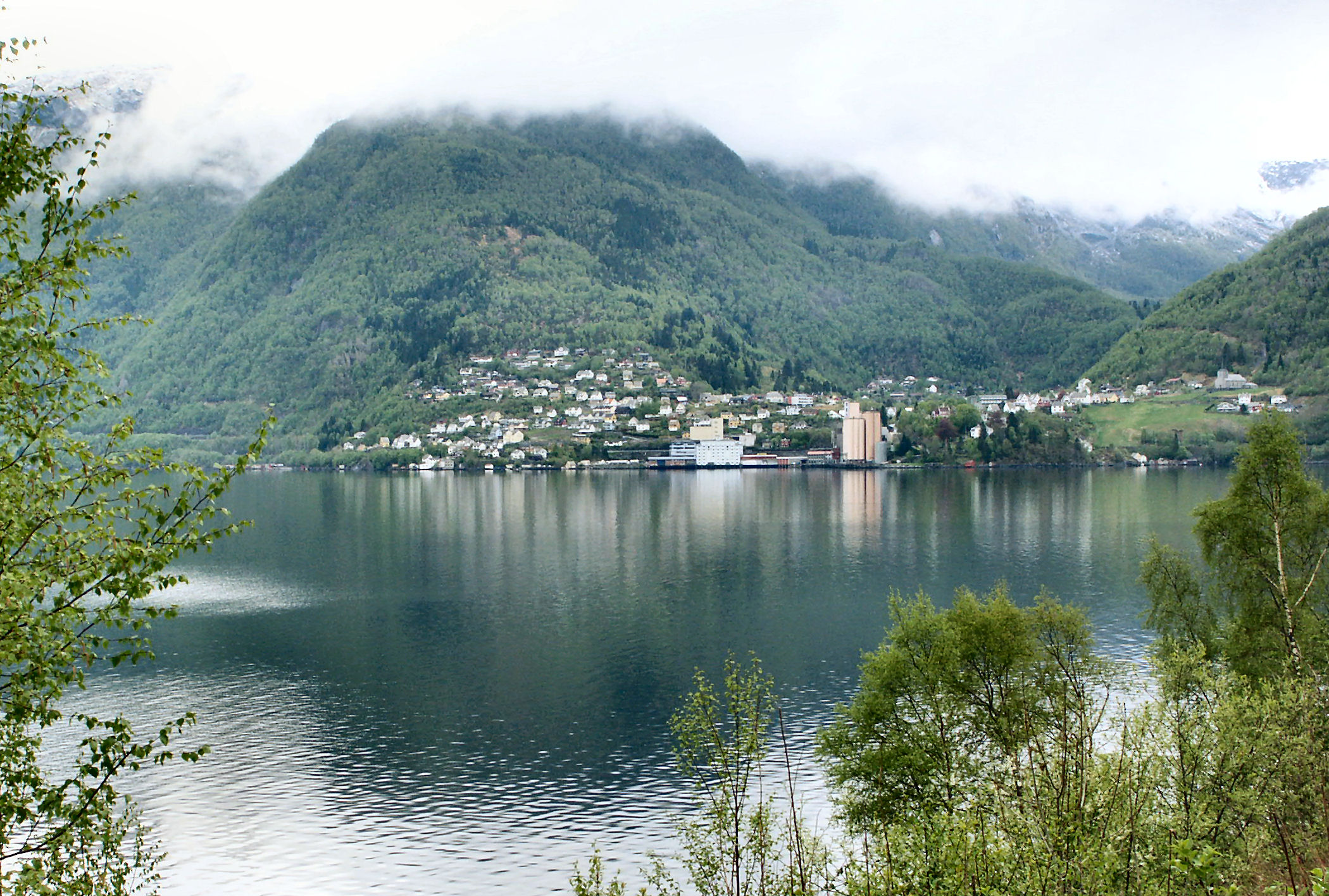 Vaksdal ved E-16, Bergensbanen, Sørfjorden, Hordaland. Foto: Frode Inge Helland, 14.05.2006.